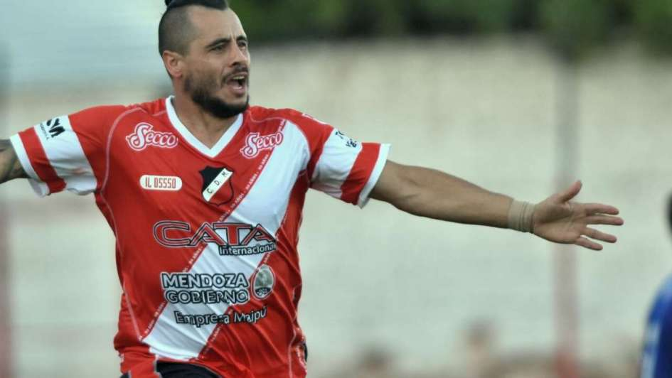 GONZALO PARISI EN SU TERCER SICLO EN EL DEPORTIVO MAIPU DE MZA